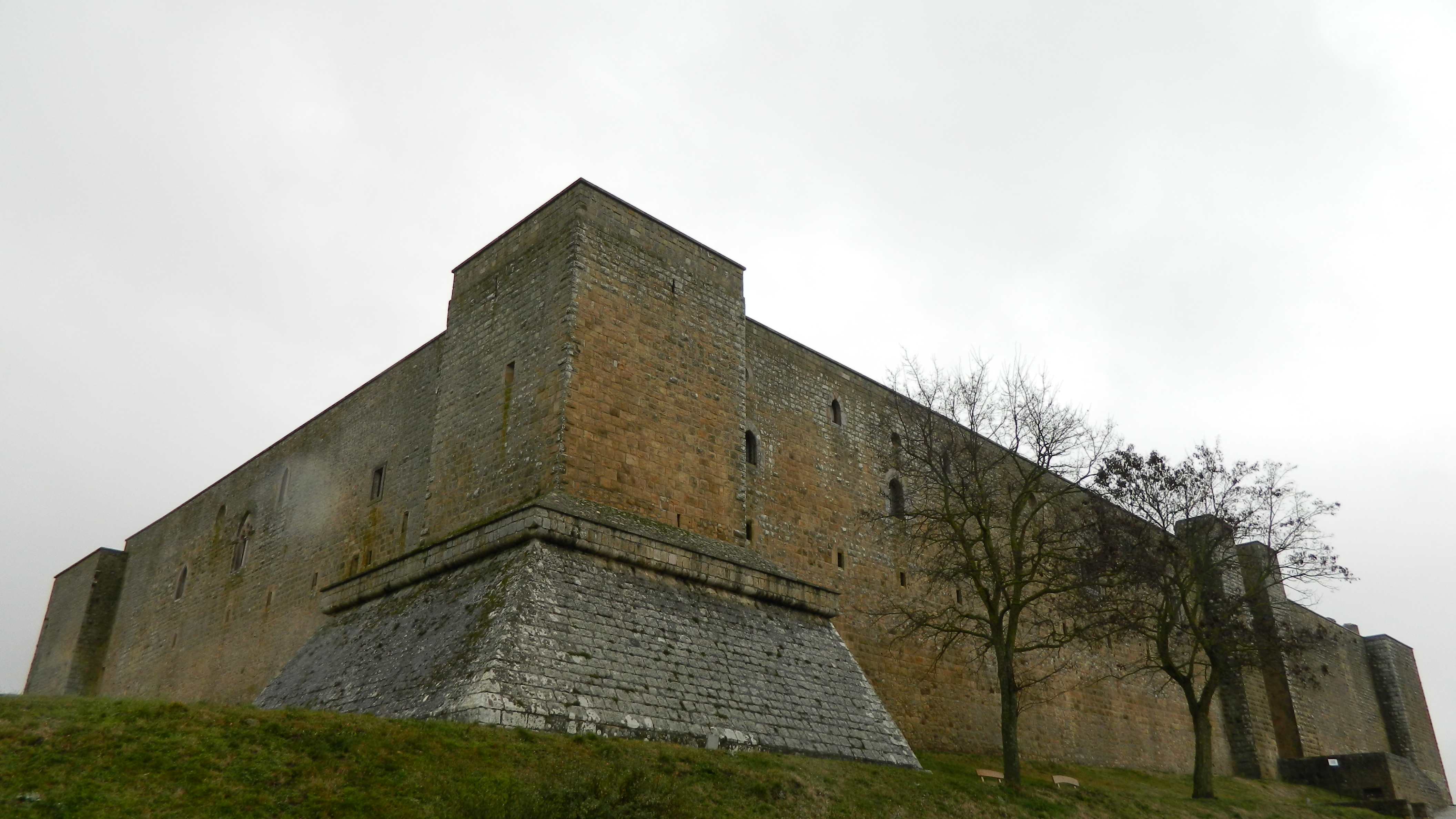 Castello di Lagopesole (Avigliano, PZ) - Esterno